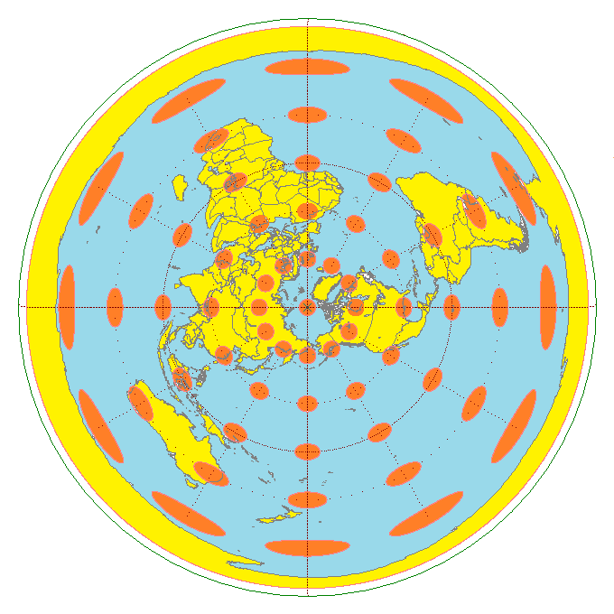 正距方位図法におけるテイソーの指示楕円